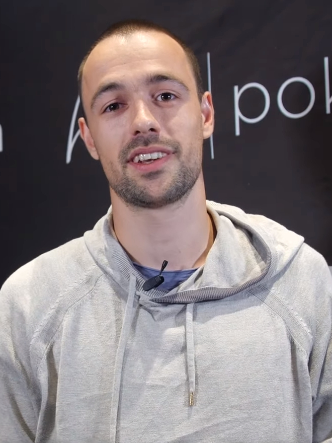 Ole Schemion vor dem Finaltisch des Baccarat Crystal WPT Tournament of Champions